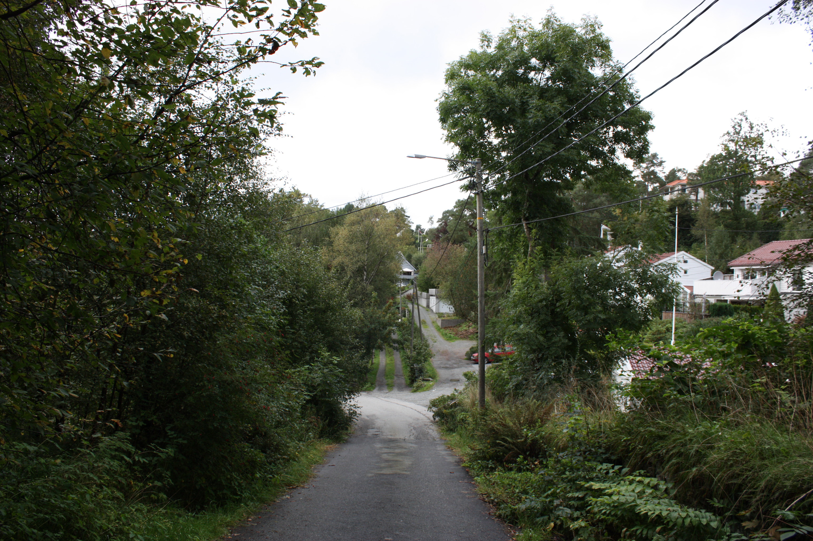 Skiparviklia, Fana, Bergen.